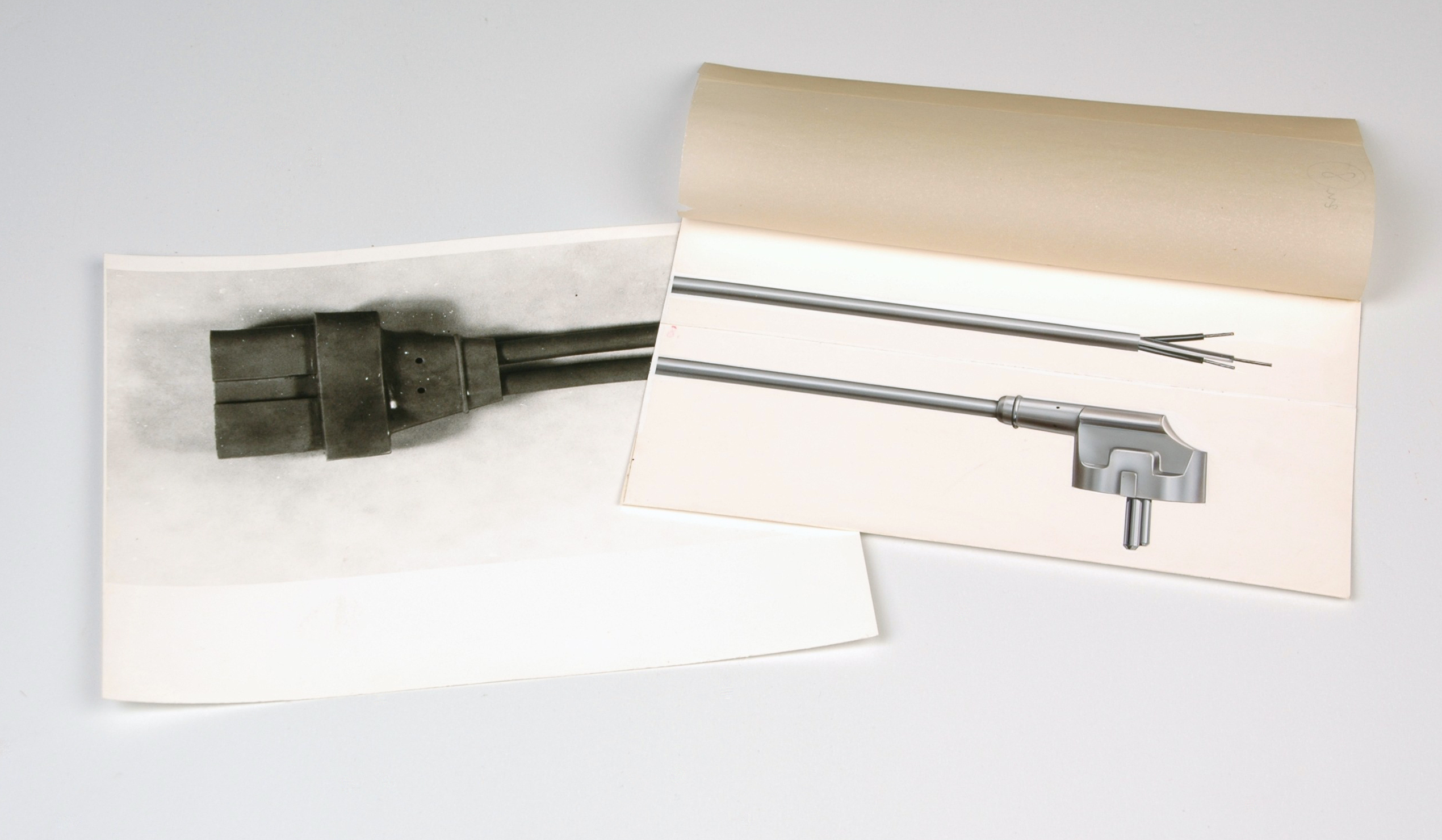 Retuschezubehör für analoge Fotografie Das linke Foto ist eine Sachaufnahme eines Gerätesteckers, einfacher schwarz-weiß Abzug,Barytpapier, mit grauem Hintergrund und Schatten von der Ausleuchtung. Beim rechten Foto wurden mittels Spritzretusche die Grautöne gleichmäßiger gearbeitet, Lichtkanten gesetzt und Schatten auf dem Hintergrund entfernt. Der Gegenstand ist komplett überarbeitet, das Foto liefert nur die Umrisse.